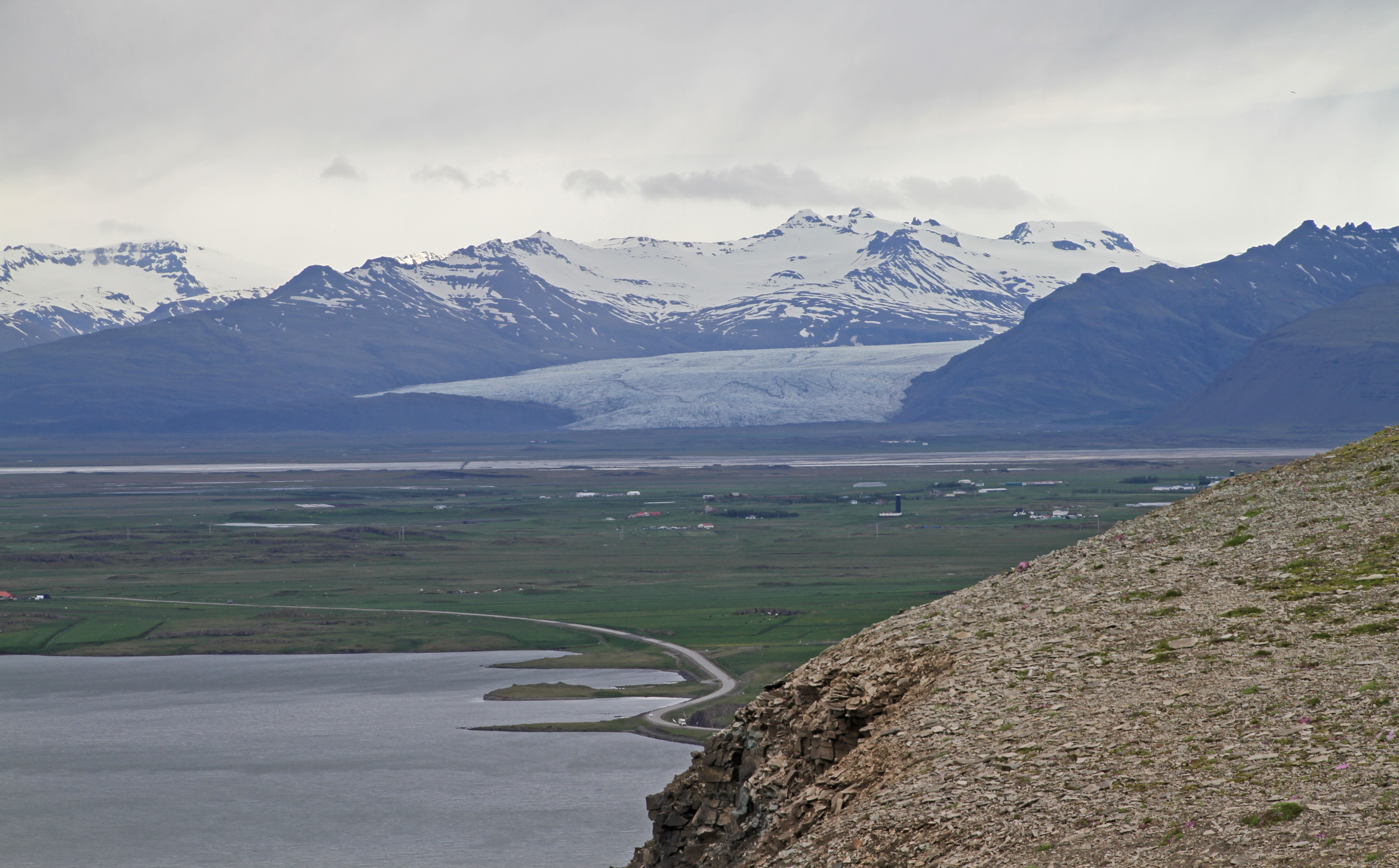 Almannaskarð-Pass